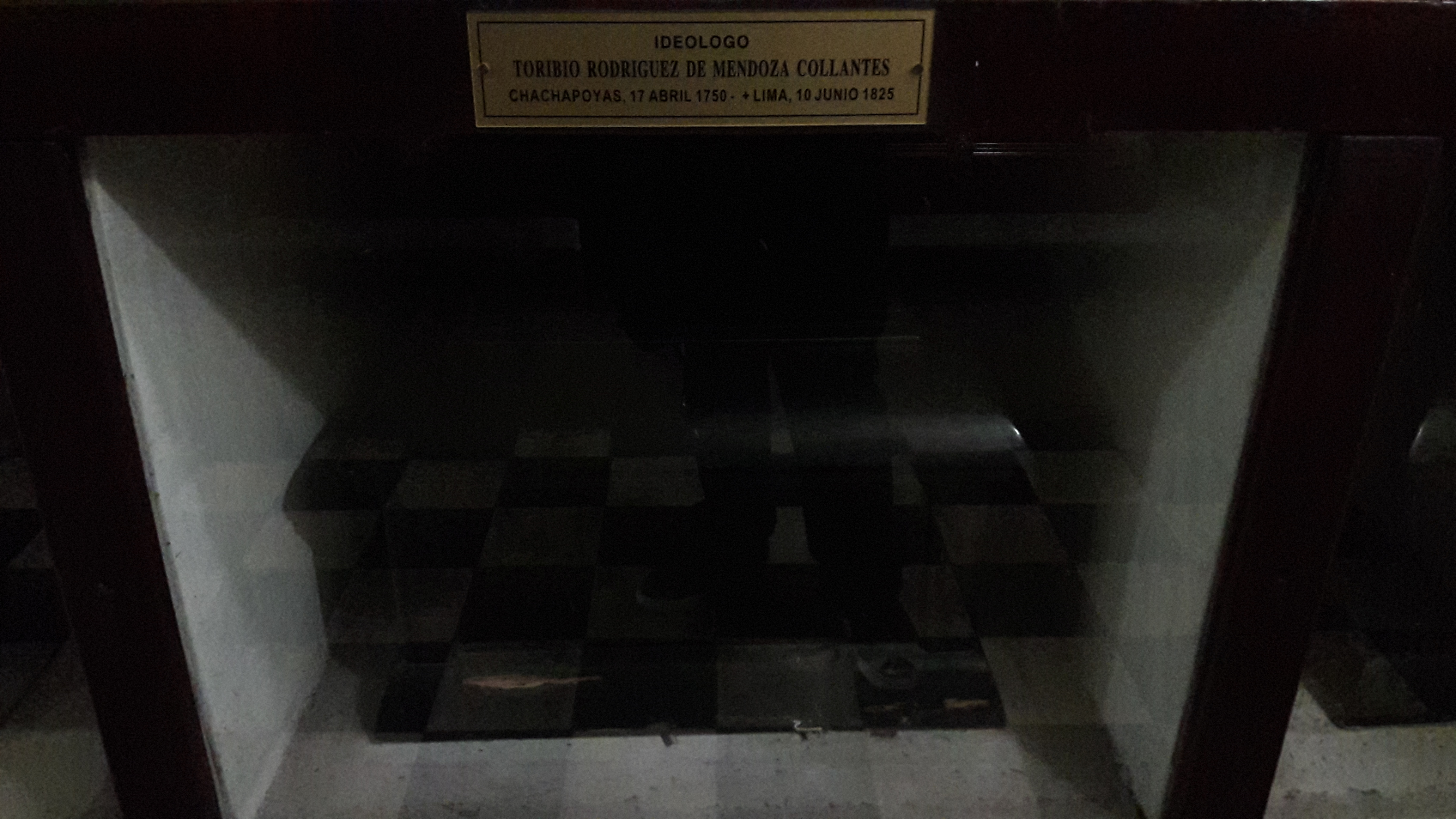 Tumba de Toribio Rodríguez de Mendoza